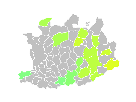 Locatie van Finse pistes in de Belgische provincie Antwerpen (met kleurschakering voor afstandsgradering).